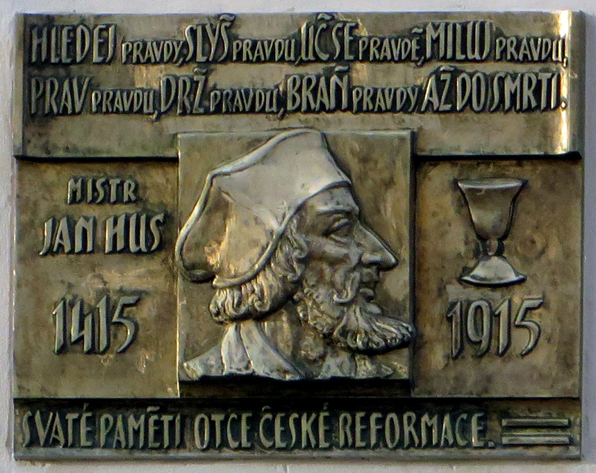 Městská knihovna v Poděbradech (dříve stará radnice). Stav po rekonstrukci – pamětní deska. GPS: 50.1424758N, 15.1192469E